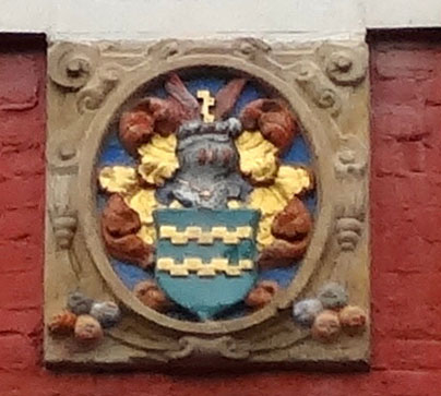 De "Wildeman", Westhaven 40. Gevelsteen met familiewapen van de dichter Floris Schoonhoven